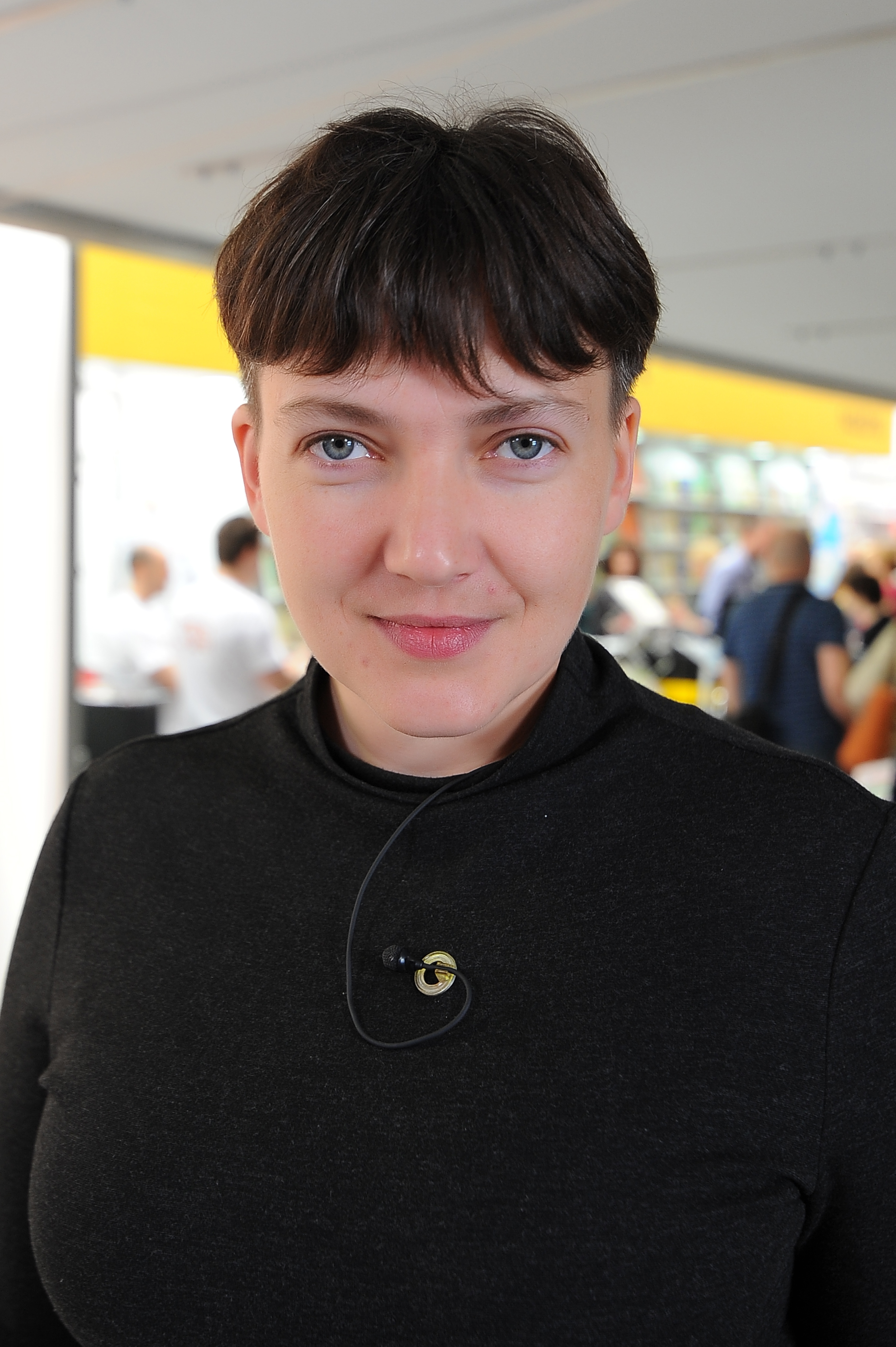 Nadiya Savchenko podczas Warszawskich Targów Książki 2017.